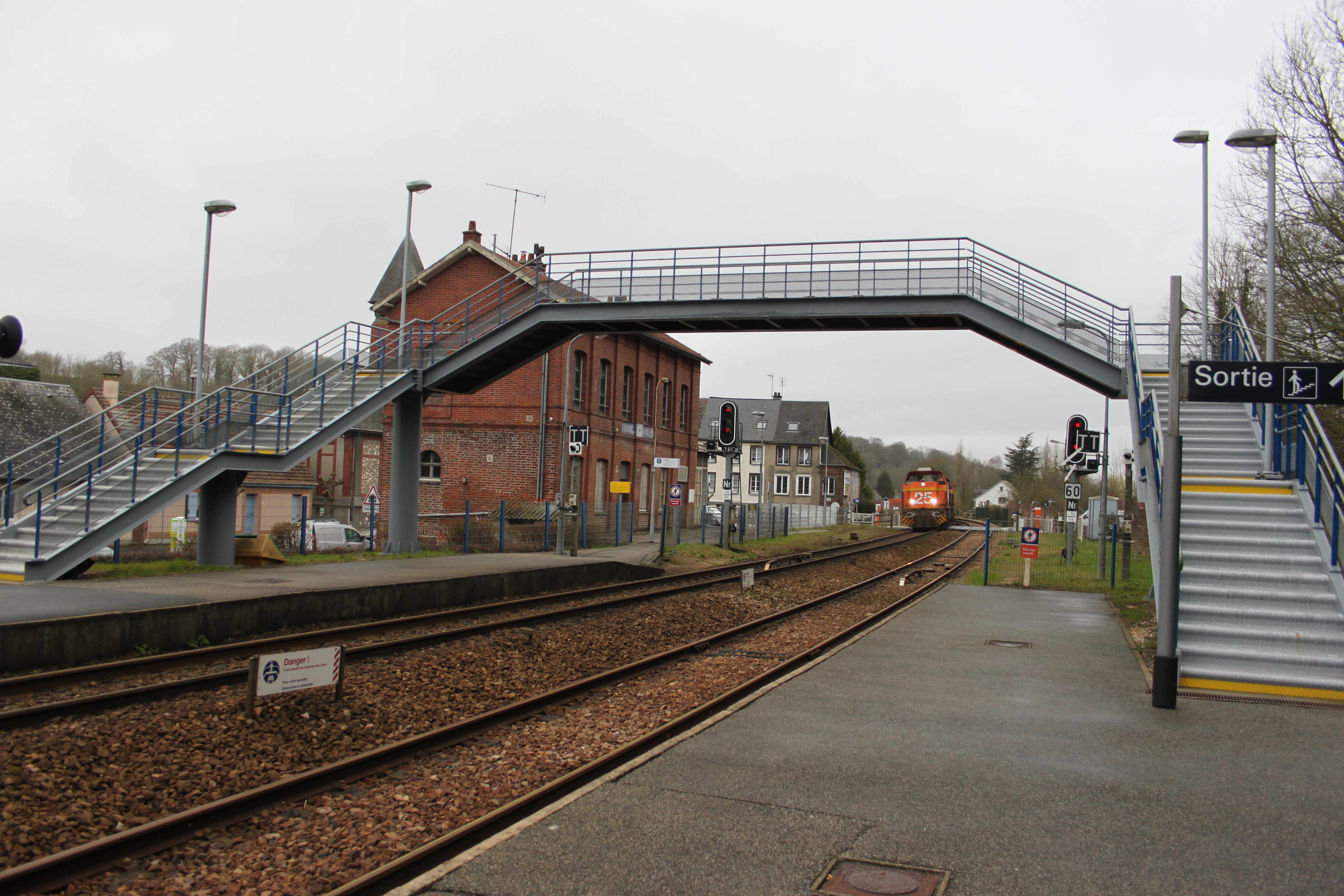 Longueville-sur-Scie(76), ligne de Malaunay à Dieppe, gare et l'ancien bâtiment voyageur, passage d'un train de terre provenant de Rouxmesnil-Bouteilles à destination du port de Rouen . (tiré par une Unité Multiple(UM) composée de deux Vossloh G 1206 (les n°25 et 13) .